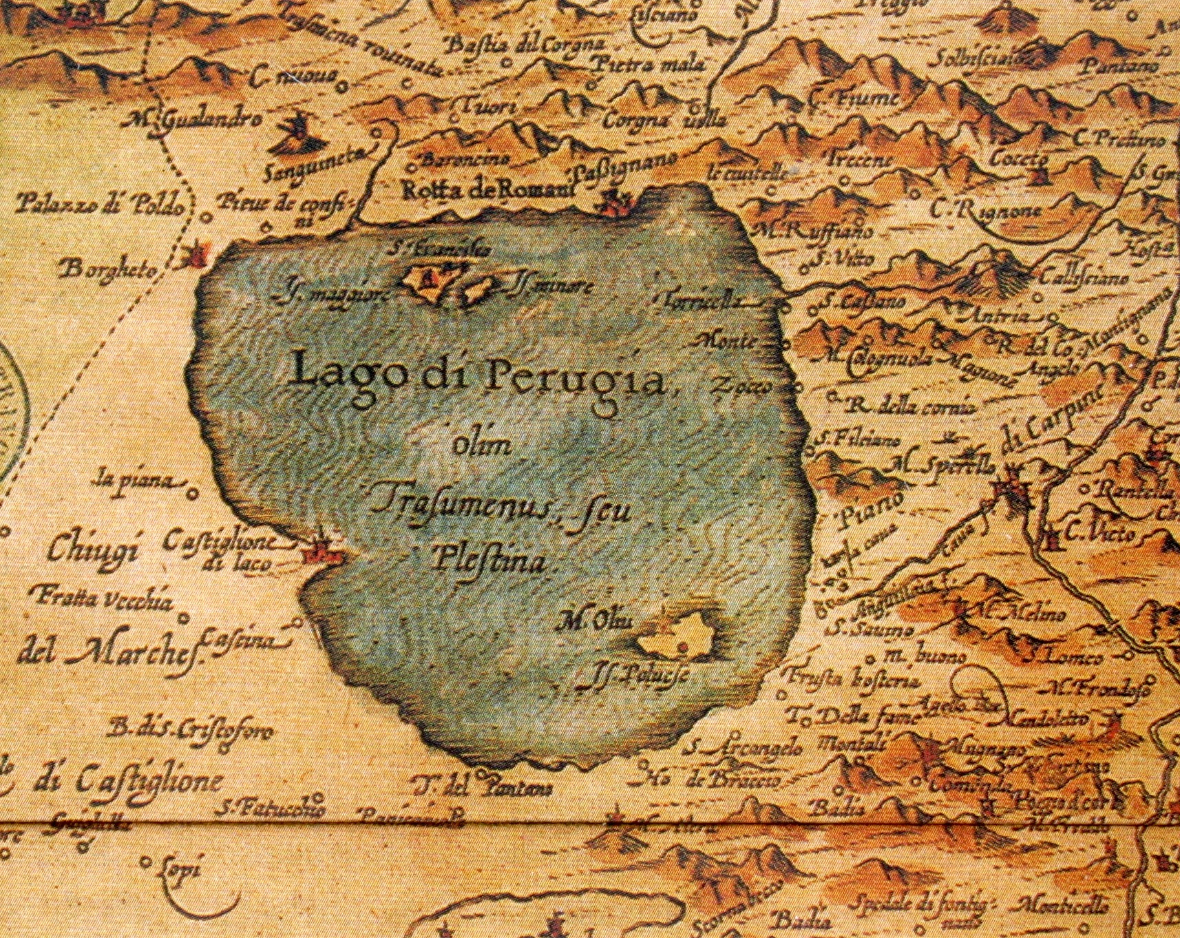 Isola Polvese Lago Trasimeno, Plan von um 1600 von G.A. Magini